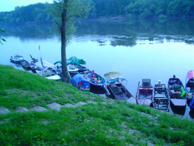 Krapje, rijeka Sava (spust čamcima Sisak-Brod)